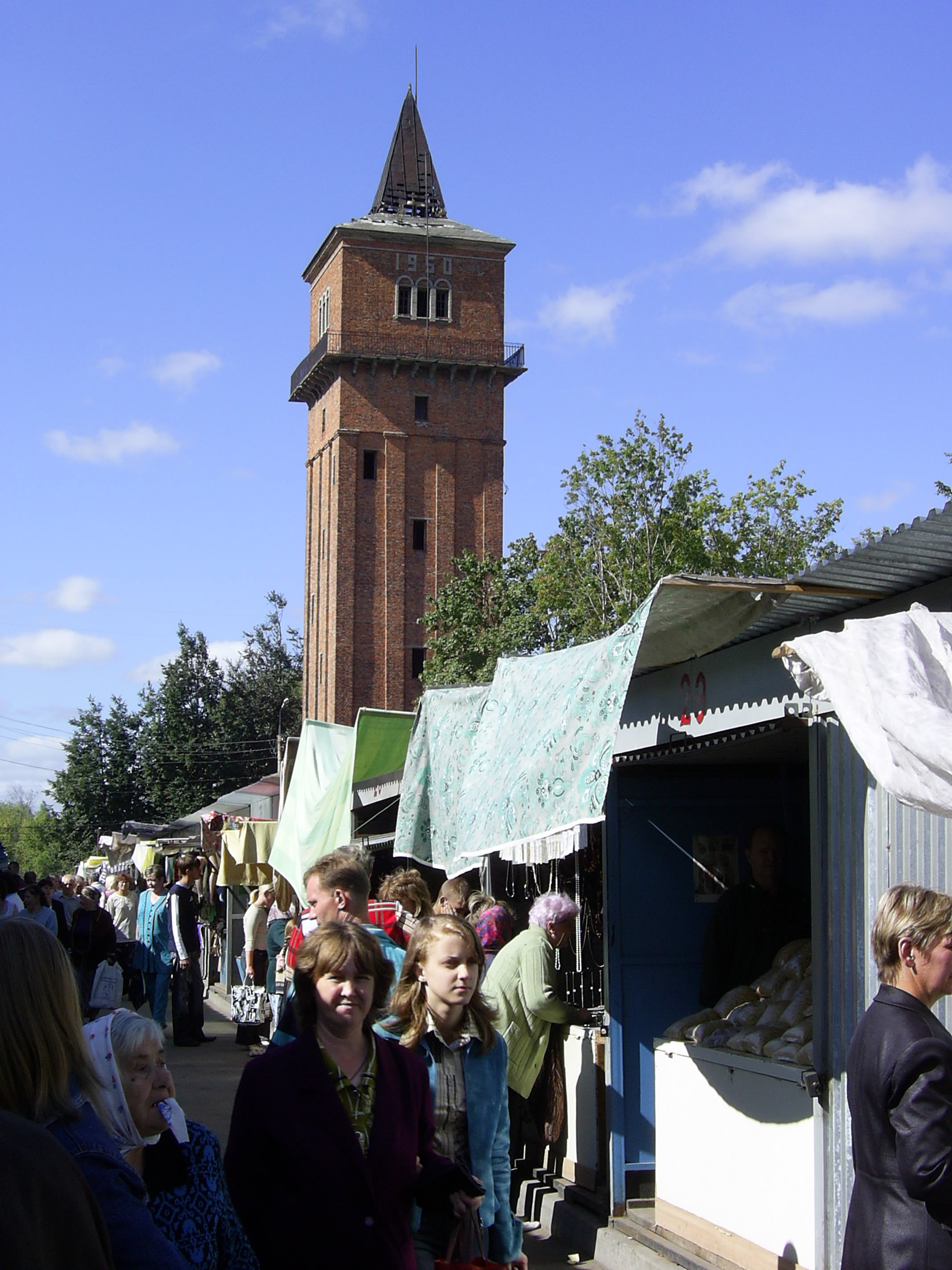 Водонапорная башня на рынке в г.Кимовске, Тульская область